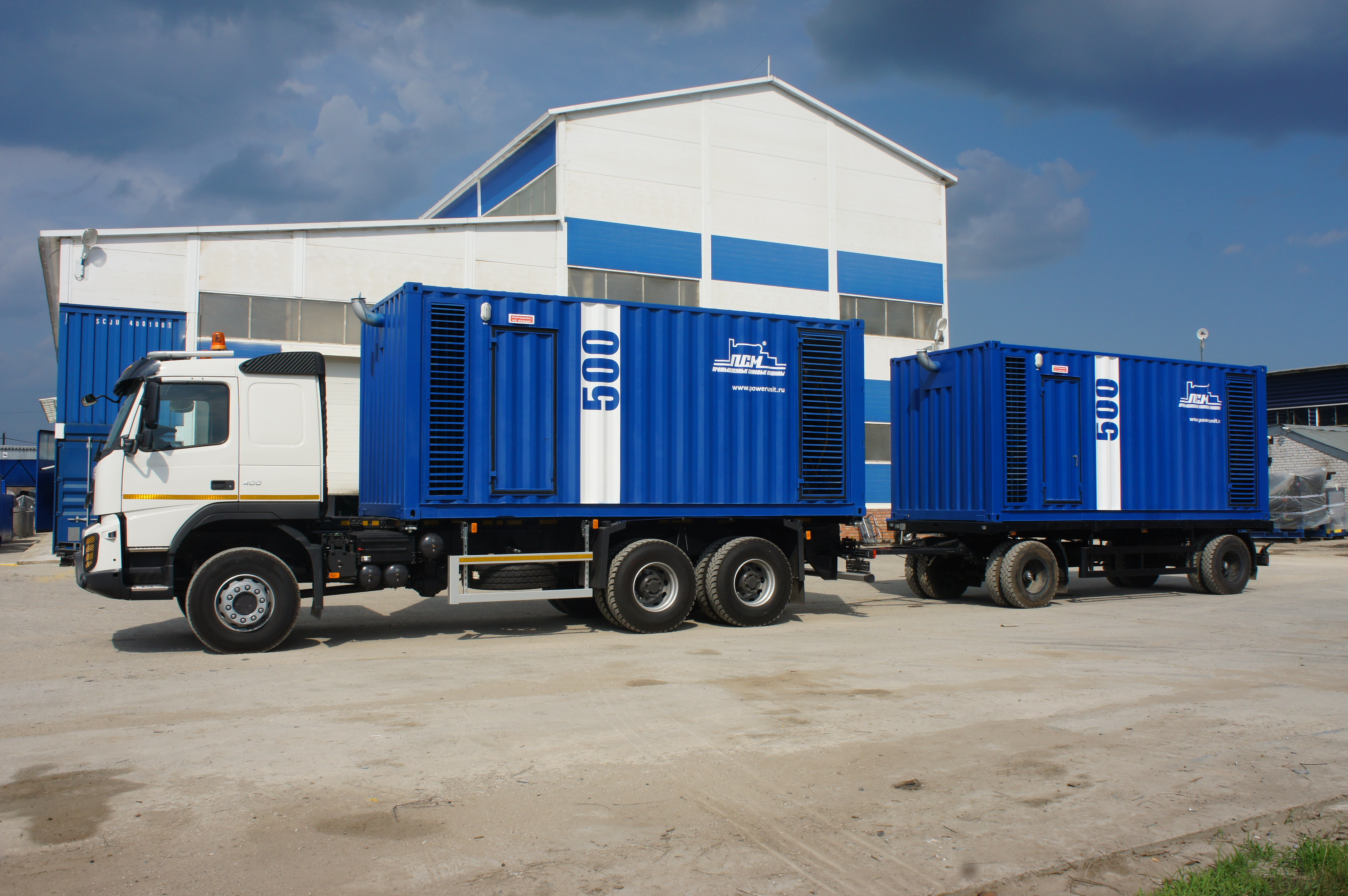 Передвижной источник энергии мощностью 1 Мвт, созданный на заводе ПСМ для аварийно-спасательной службы центрального региона России.